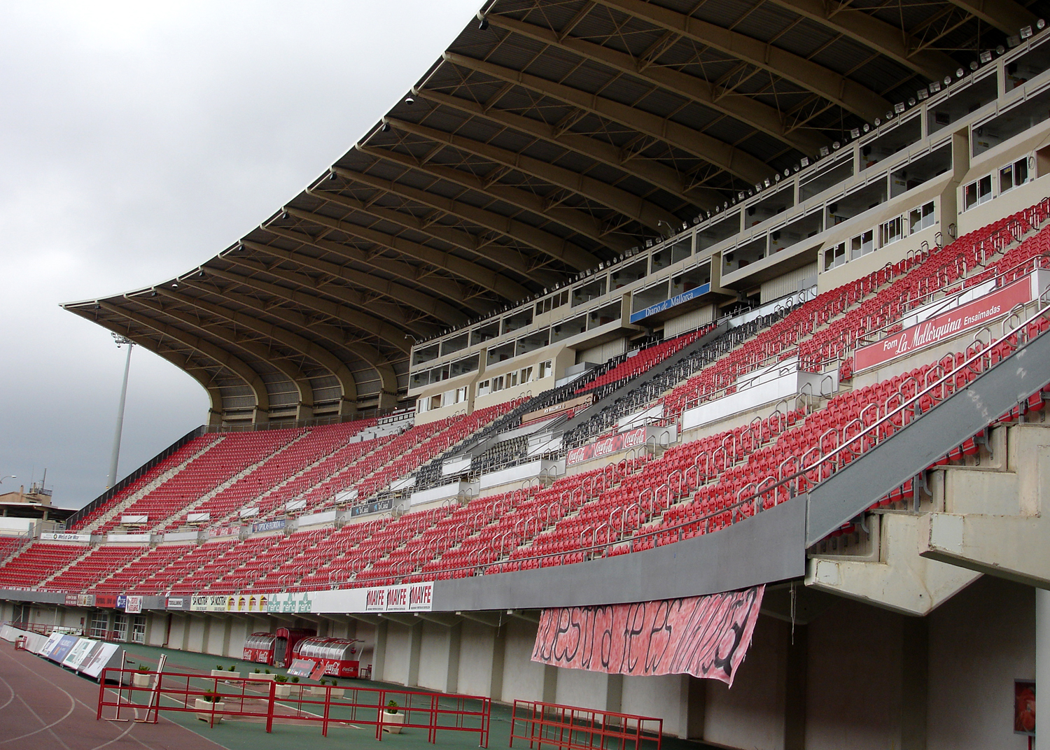 Son Moix aka ONO Estadi (RCD Mallorca)